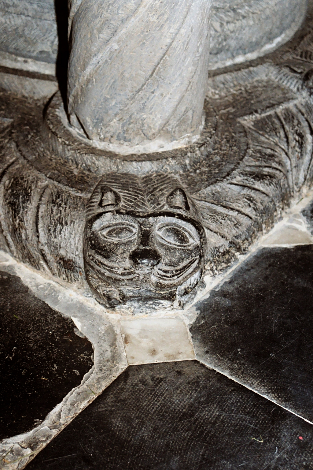 Belgique - Flandre - Fonts baptismaux romans de Zedelgem